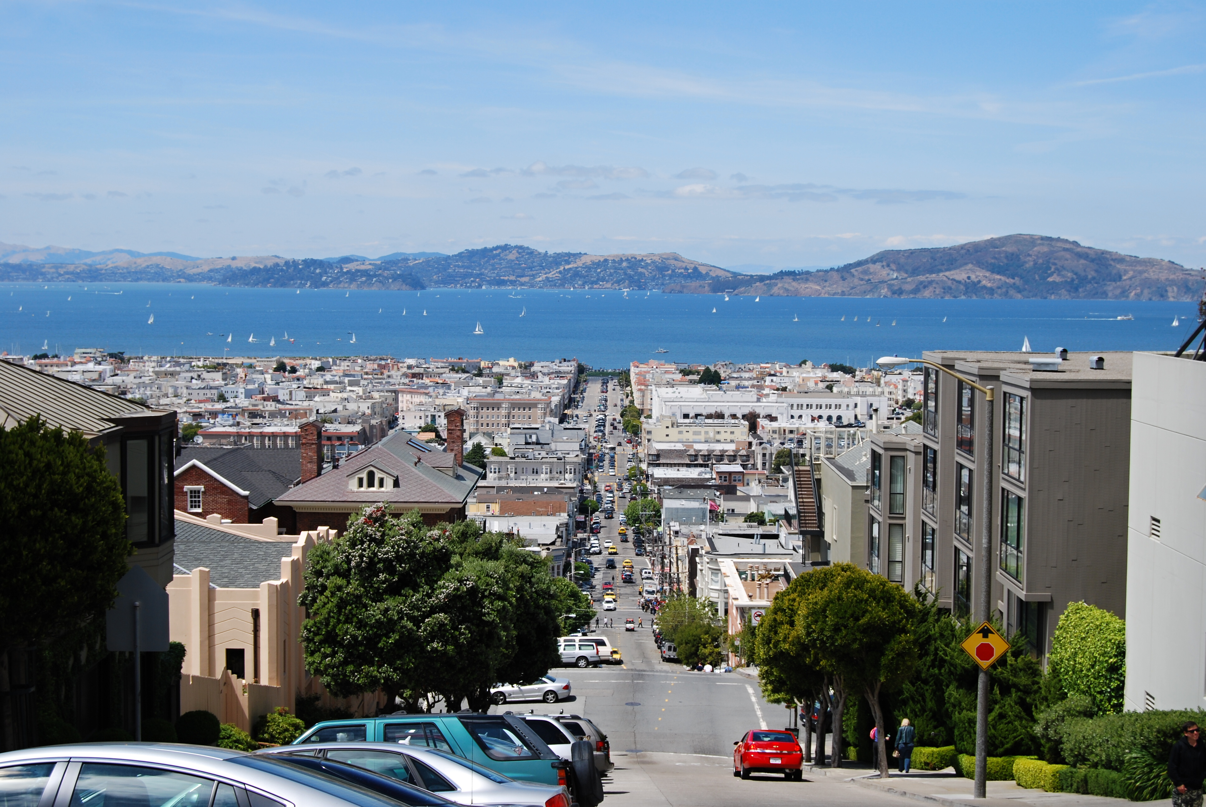 San Francisco